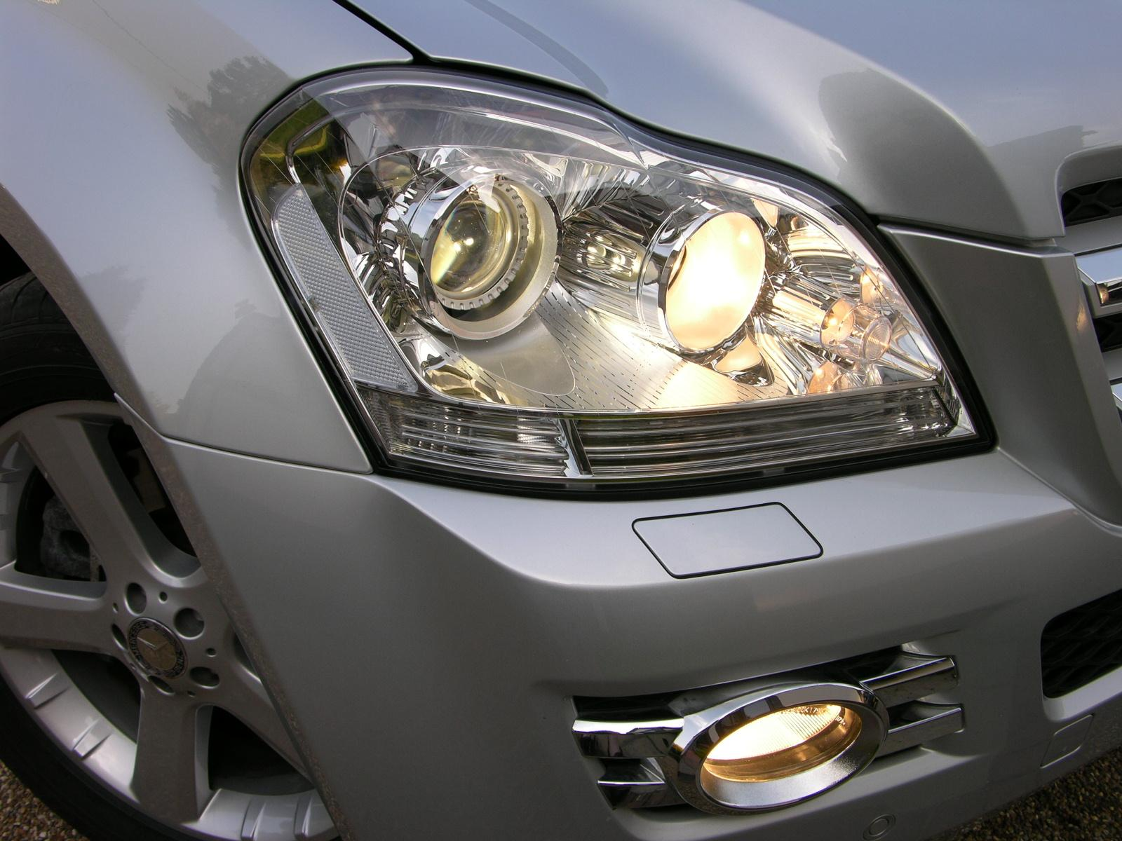 Mercedes Benz GL420 CDi 4-Matic